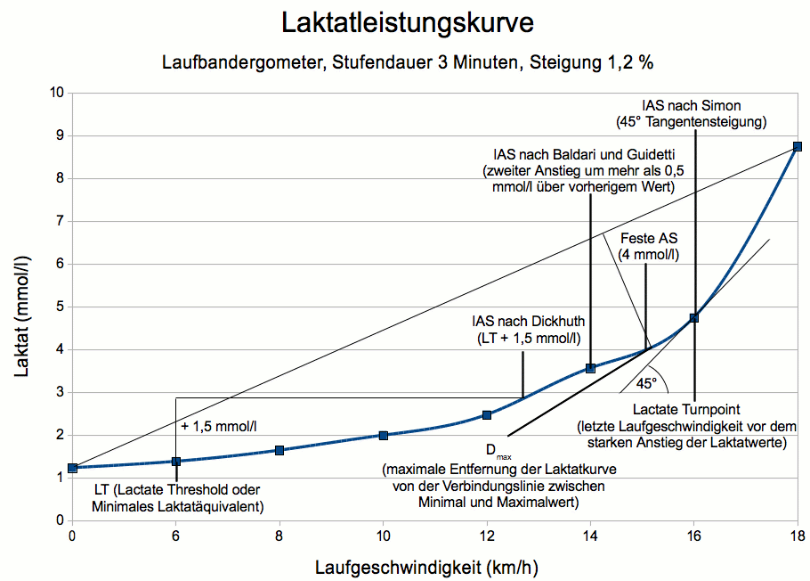 Laktatleistungskurven mit verschiedenen individuellen anaeroben Schwellen (IAS). Die Werte für die IAS weisen je nach verwendeter Methode große Unterschiede auf und reichen von ca. 2,9 mmol/l bis ca. 4,8 mmol/l.